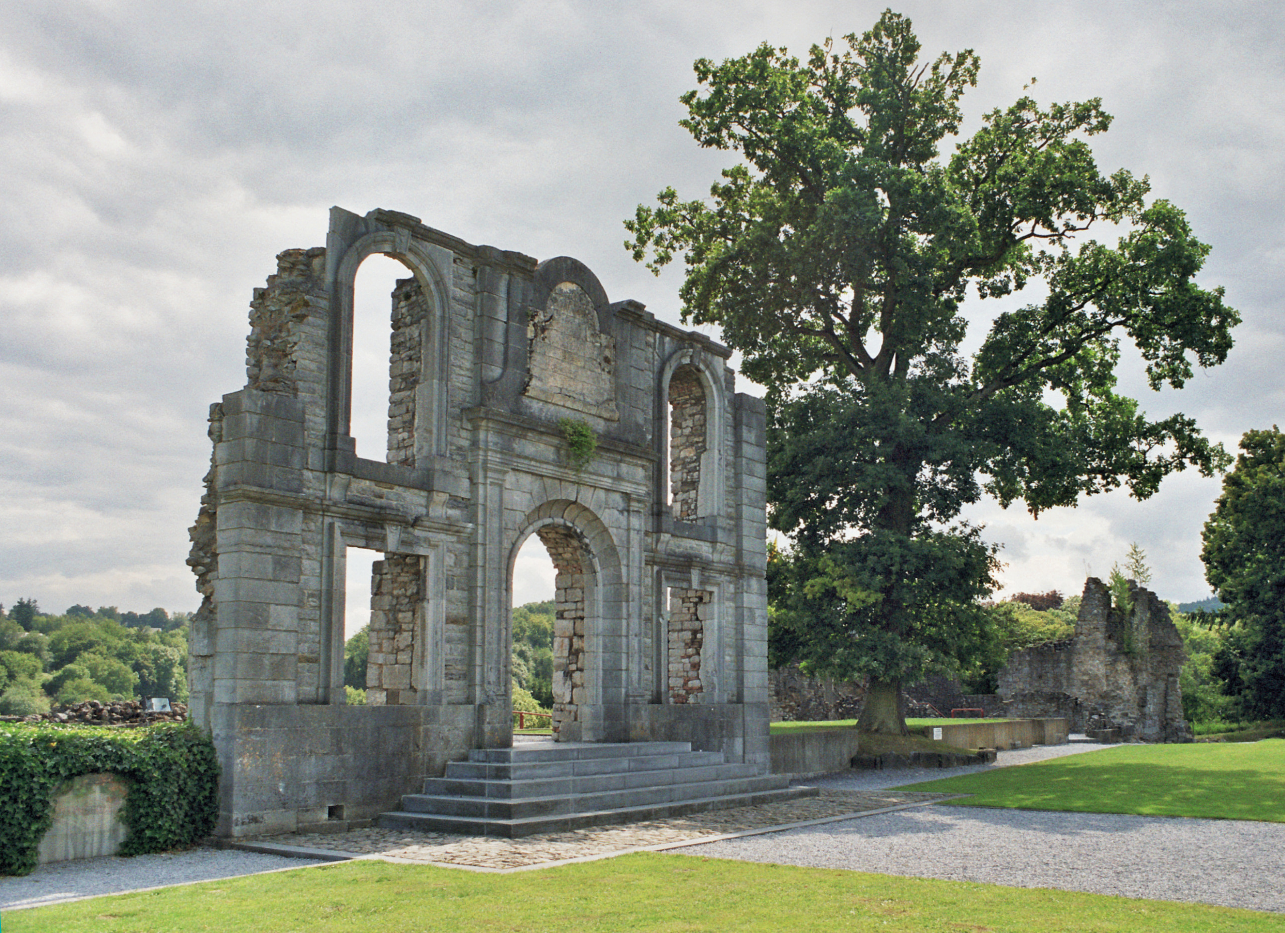 Erhaltener Mittelrisalit der Schlosses Rochefort in Belgien